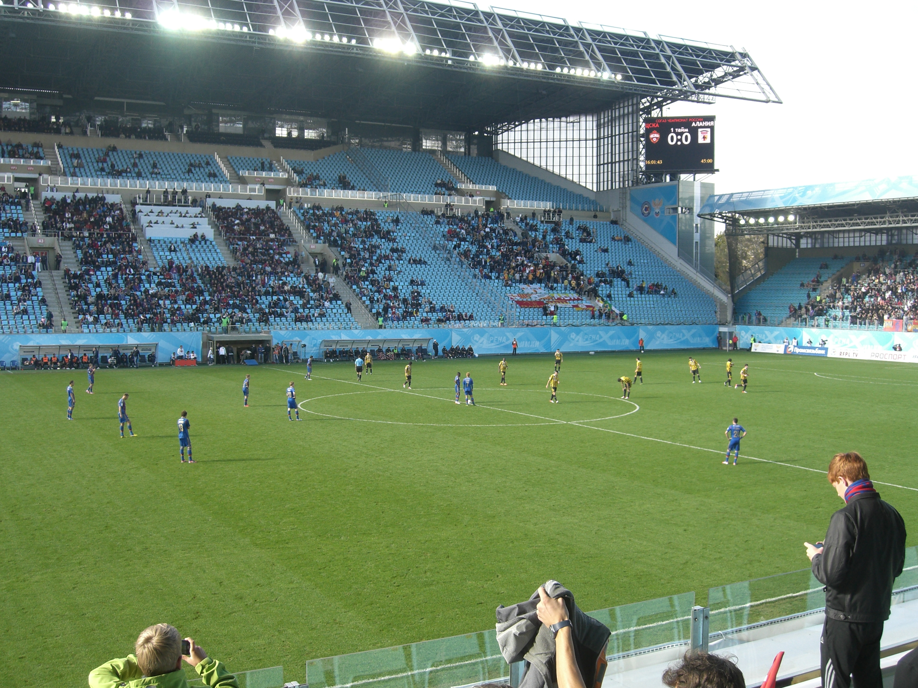 ЦСКА-АЛАНИЯ 16.09.2012 стадион "Арена-ХИМКИ"